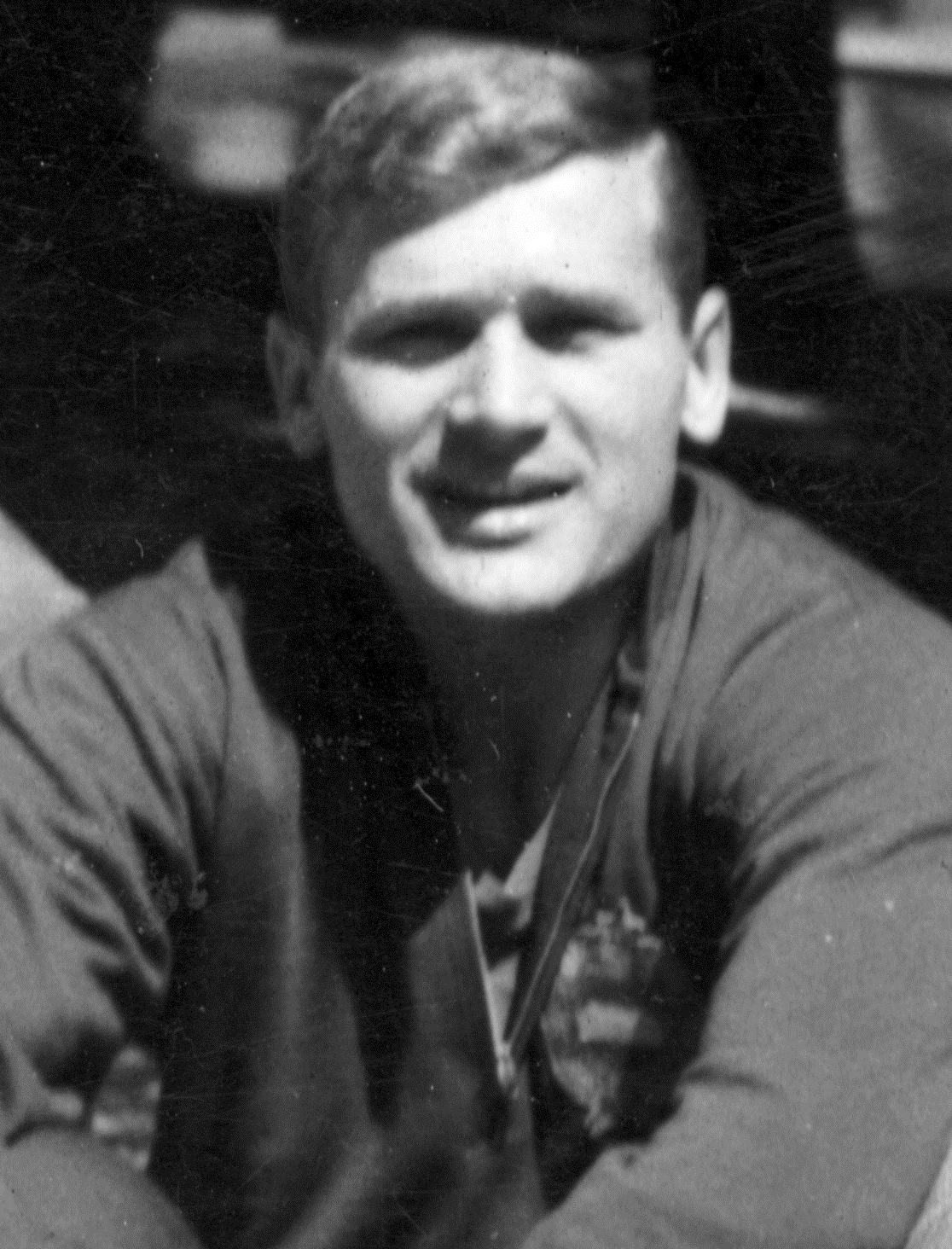 Tichy Lajos magyar labdarúgó, edző.